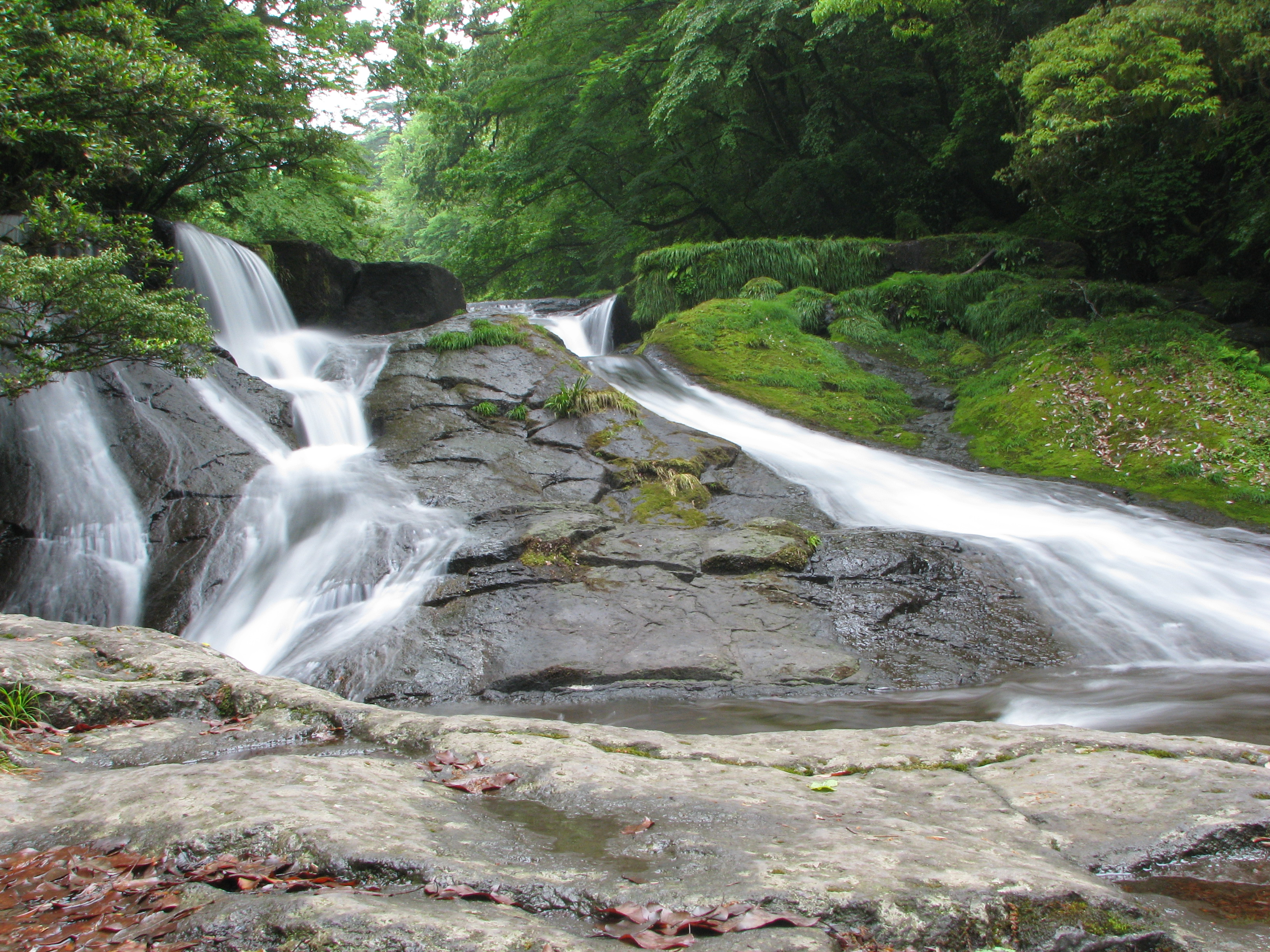 四十三万滝（熊本県）